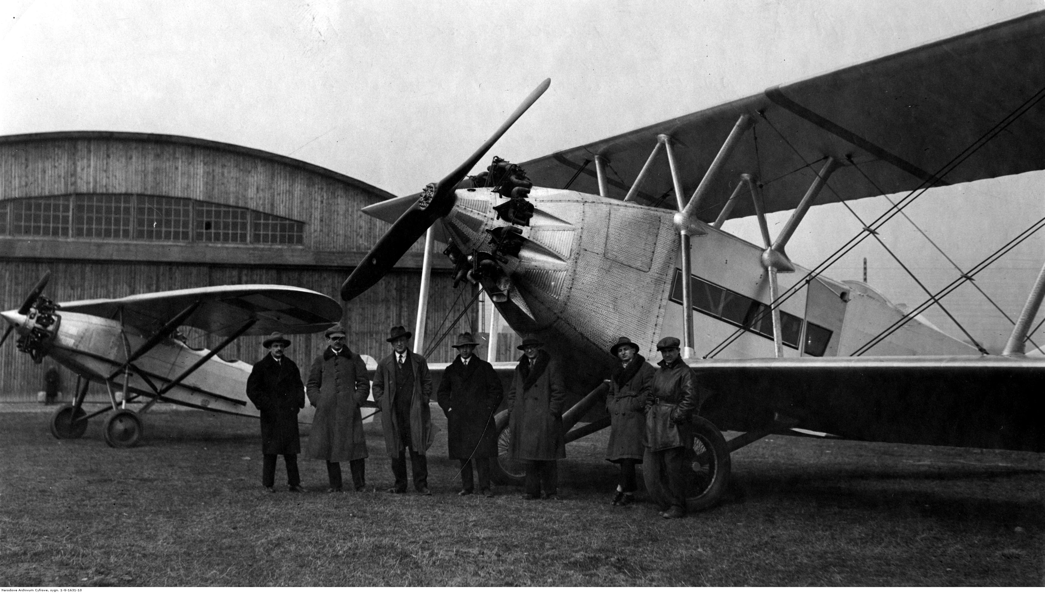 Samolot komunikacyjny Lublin R-IX na lotnisku w Lublinie. W tle z lewej samolot Lublin R-X.